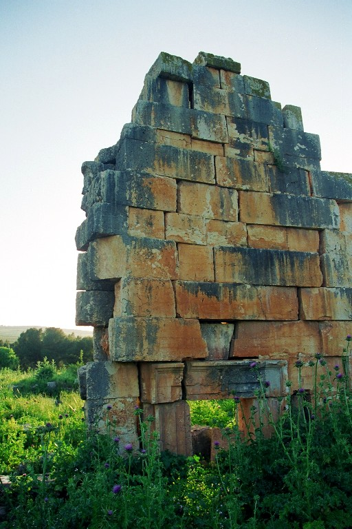 המקדש הרומאי בתל קדש